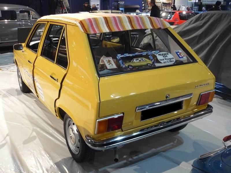 Retromobile 2012